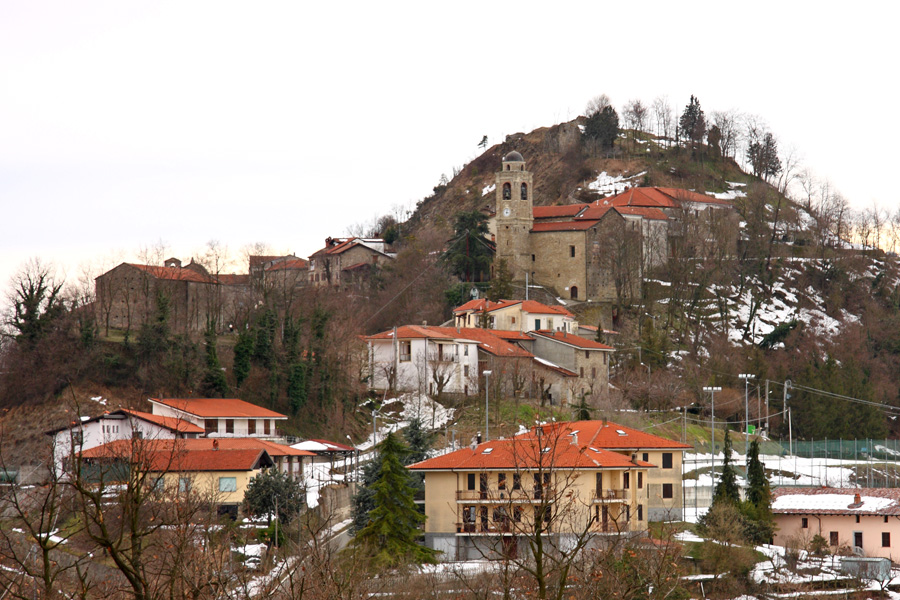 Veduta di Montechiaro alto, frazione del comune di Montechiaro d'Acqui (AL)